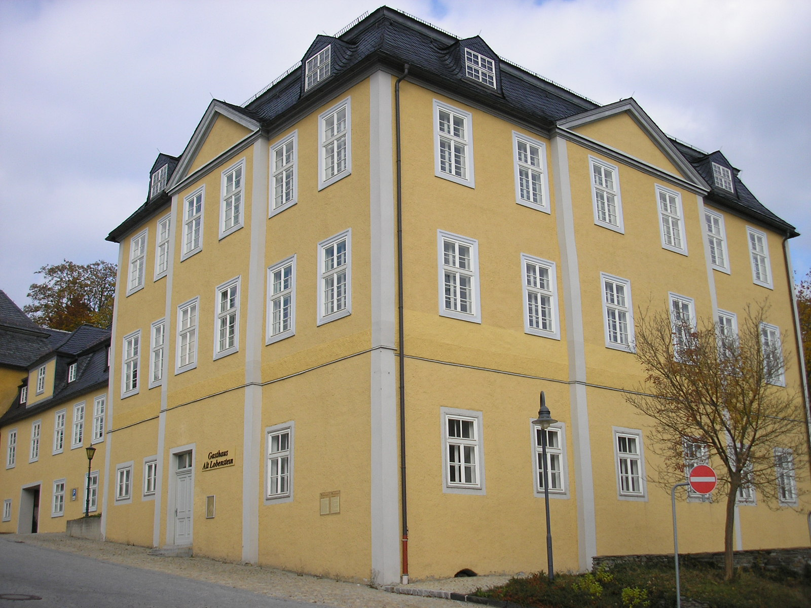 Der Ostflügel des Schlosses in Bad Lobenstein (Thüringen).